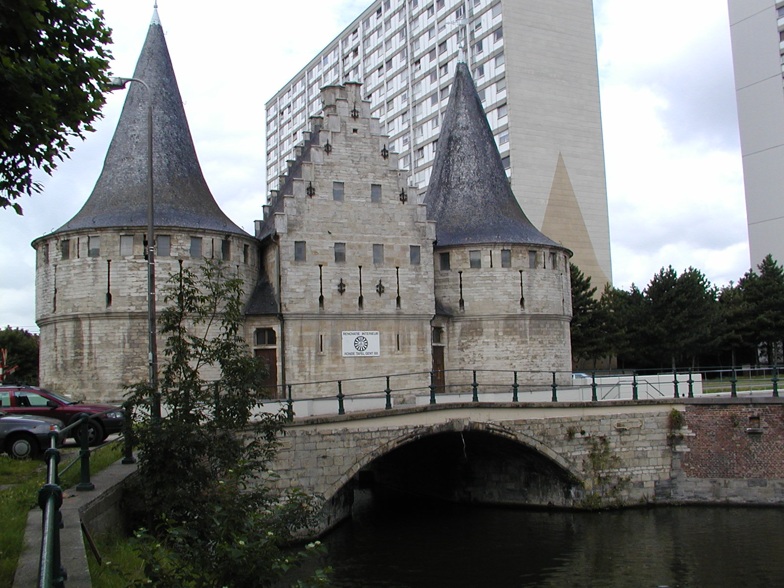 aŭtoro: Yves Nevelsteen dato: aŭgusto 2005